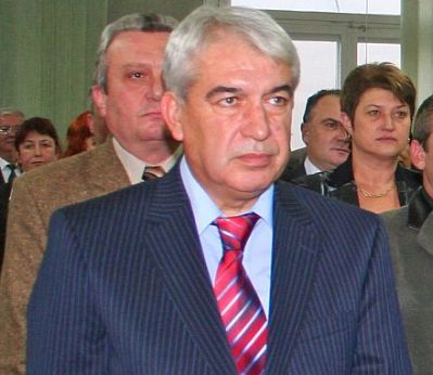 Красимир Мирев